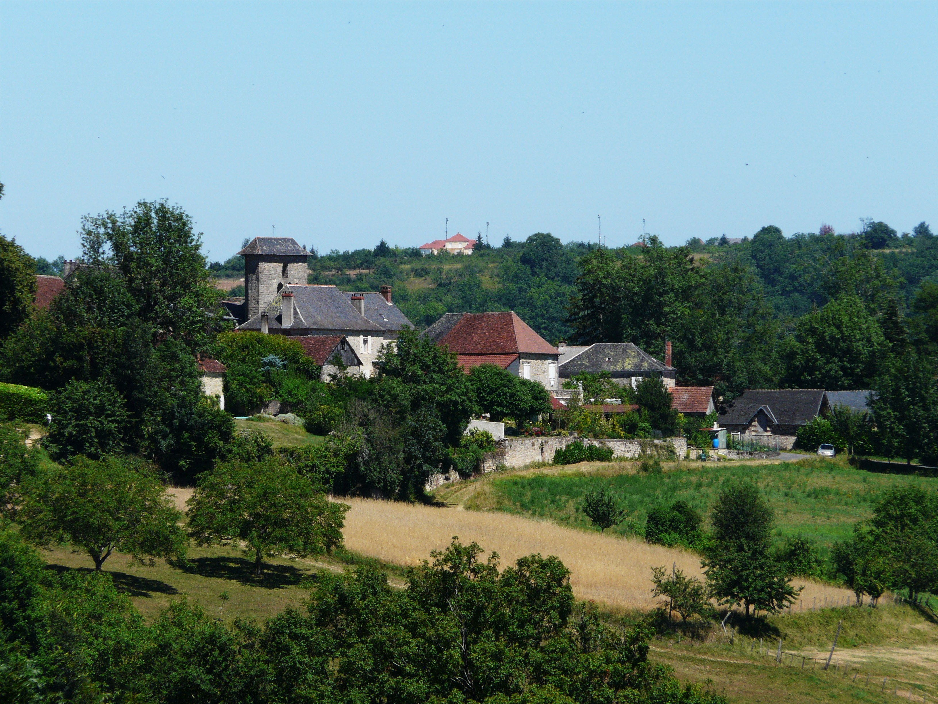 Le village de Coubjours, Dordogne, France.